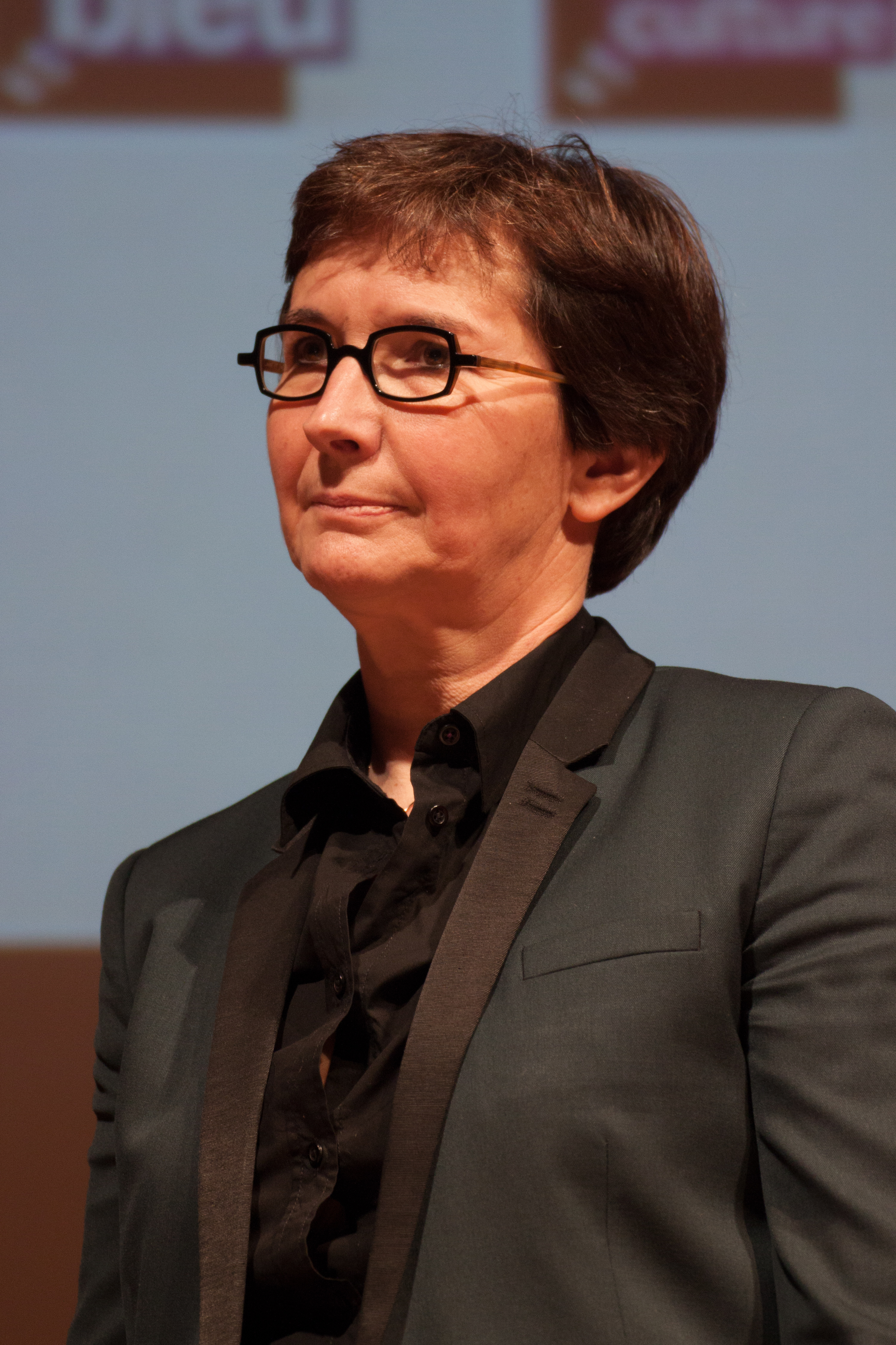 au Forum Libération 2013 de Grenoble